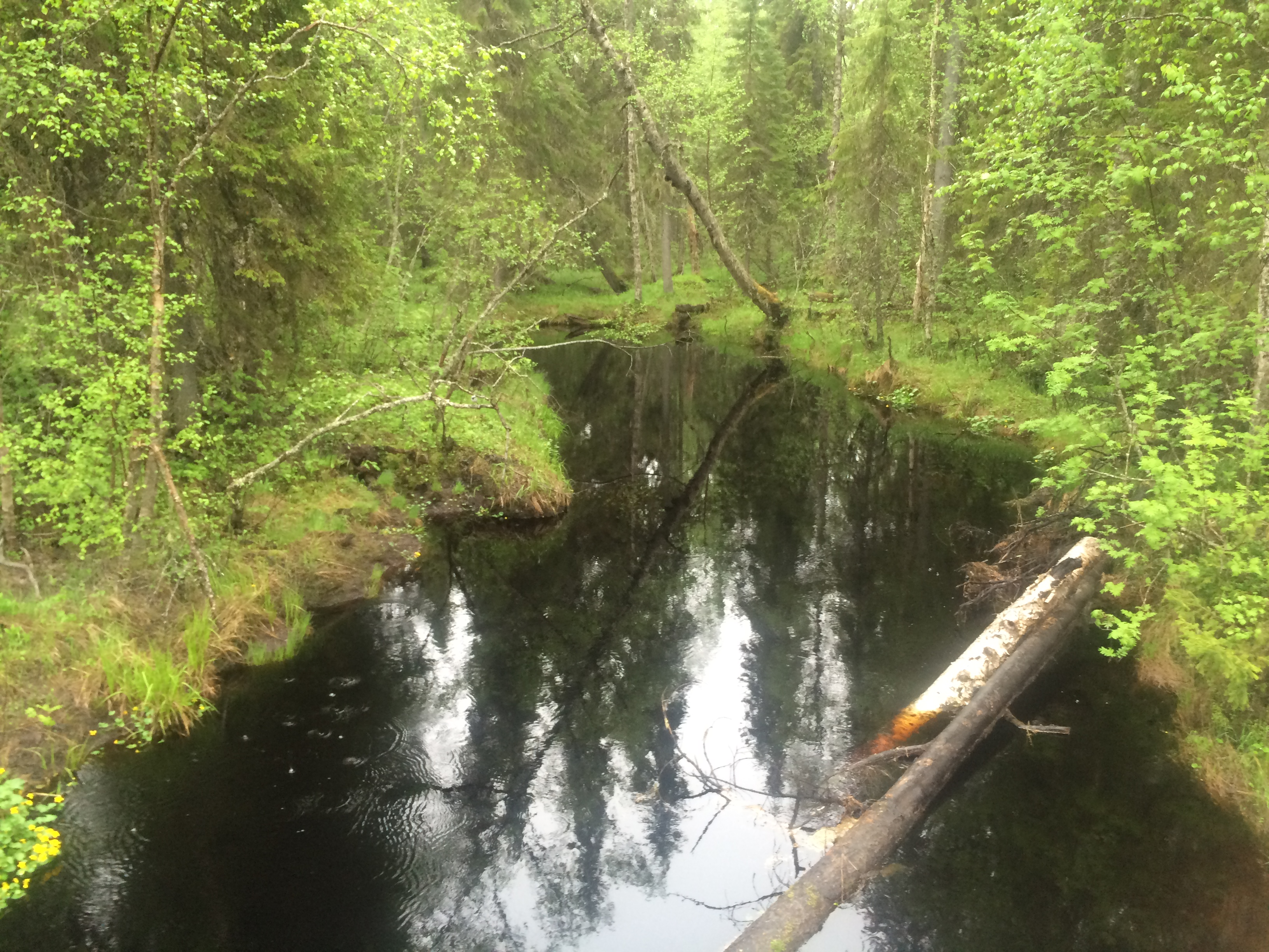 река Ронда